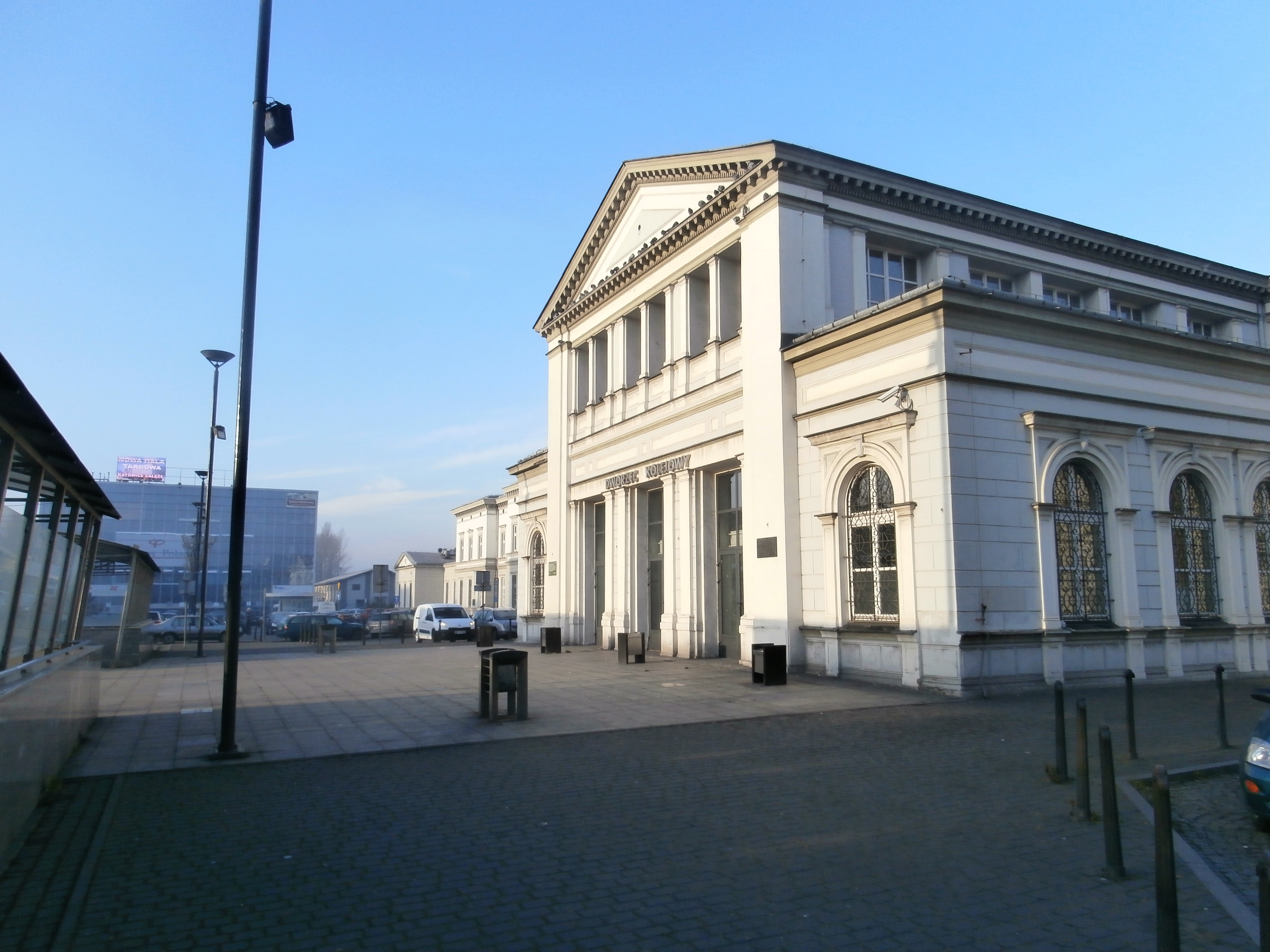 Dworzec Sosnowiec Glowny